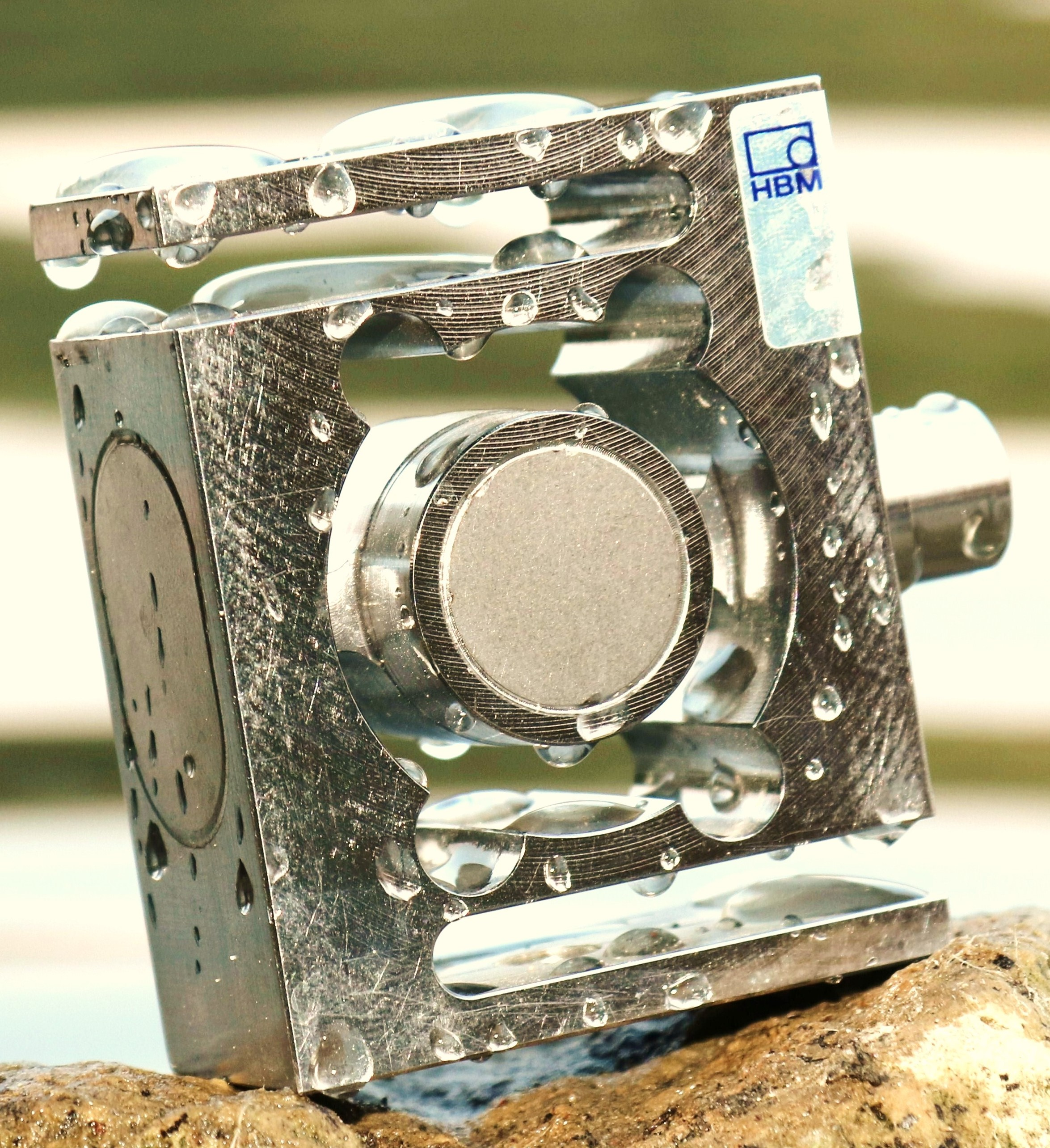 S-alakú erőmérő cella, naptárkép 2016-ban